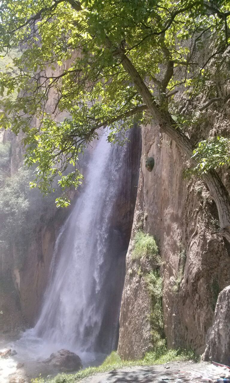 آبشار شاهاندشت